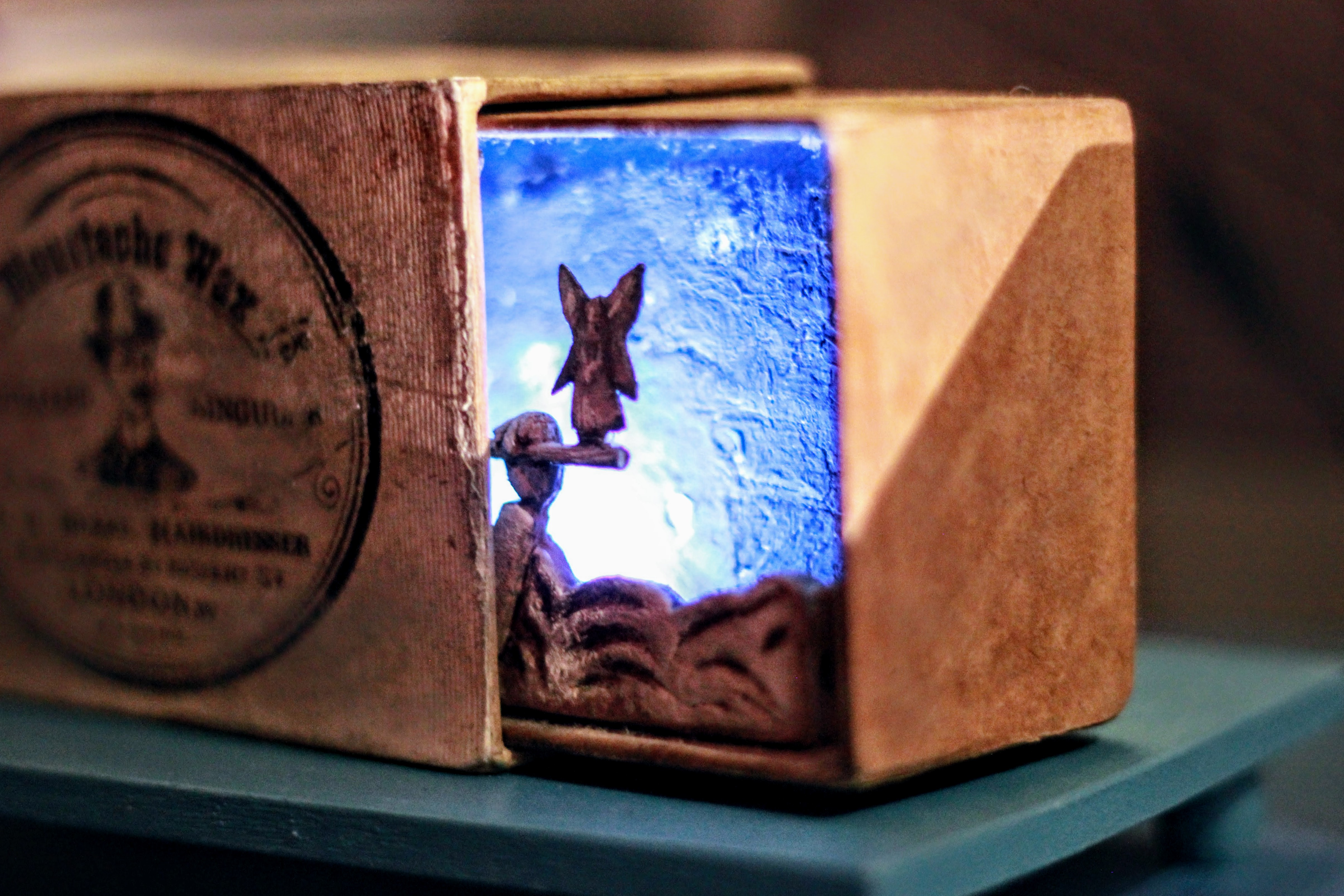 Декорации из спектакля Тайны Эльфов театра Студии Т